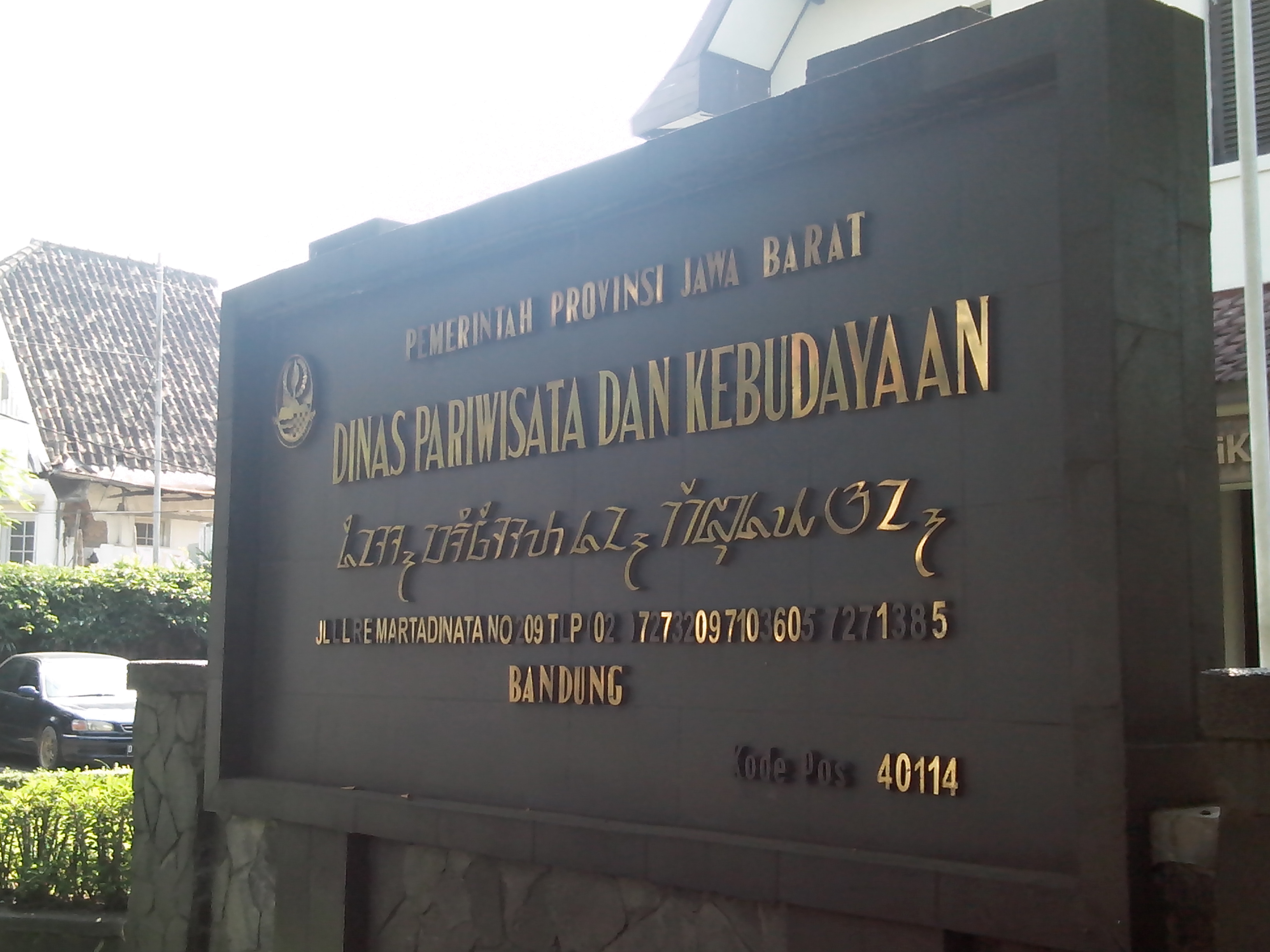 Papan nama Dinas Pariwisata dan Kebudayaan Provinsi Jawa Barat menggunakan aksara Sunda dan Latin.